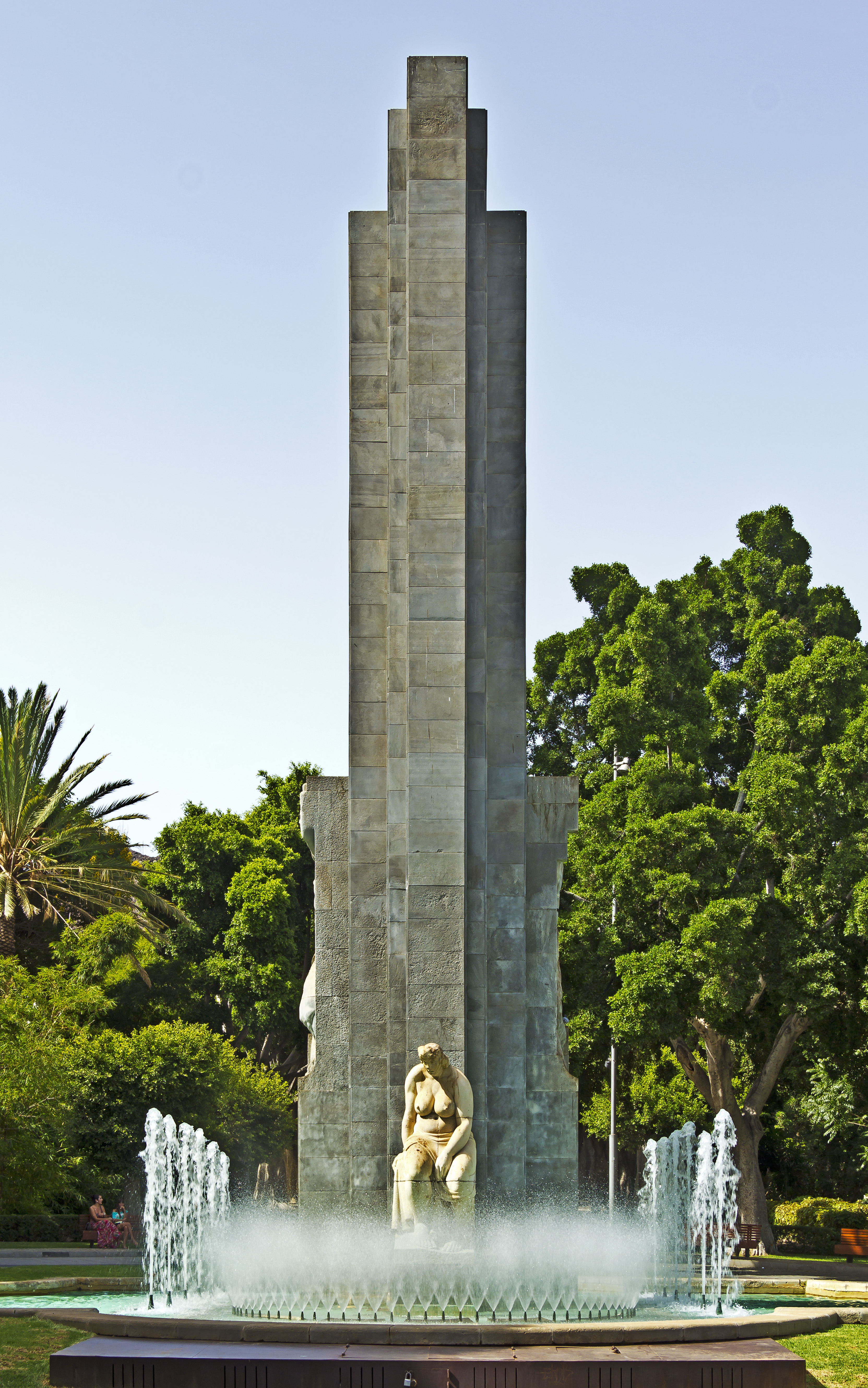 Das „Monumento a García Sanabria“, eine Gemeinschaftsarbeit des Architekten José Enrique Marrero Regalado und des Bildhauers Francisco Borges Salas, wurde 1938 zu Ehren des ehemaligen Bürgermeisters von Santa Cruz de Tenerife in dem gleichnamigen Park errichtet.